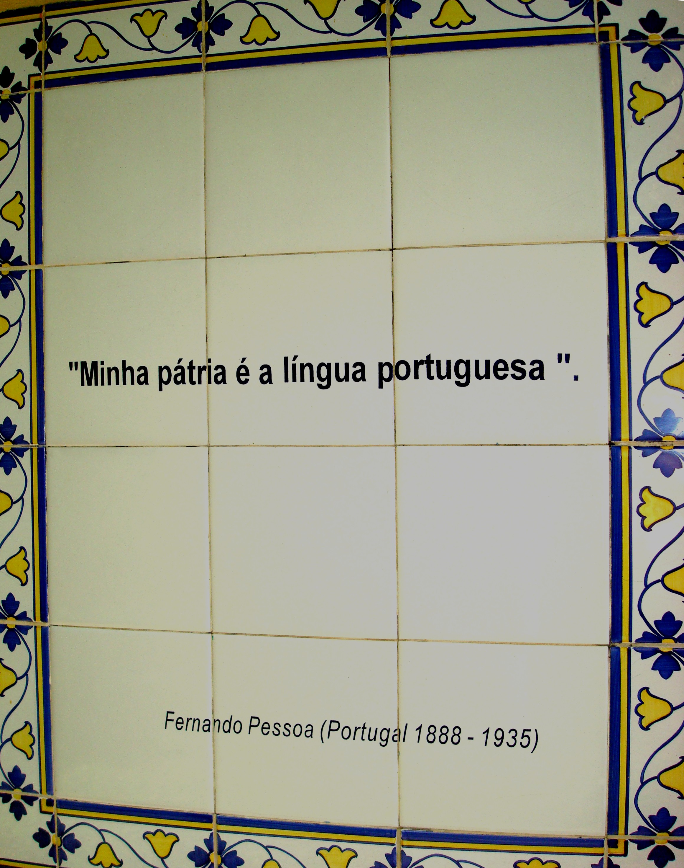 Citação de Fernando Pessoa, um dos homenageados no Bosque de Portugal, Curitiba, Brasil.